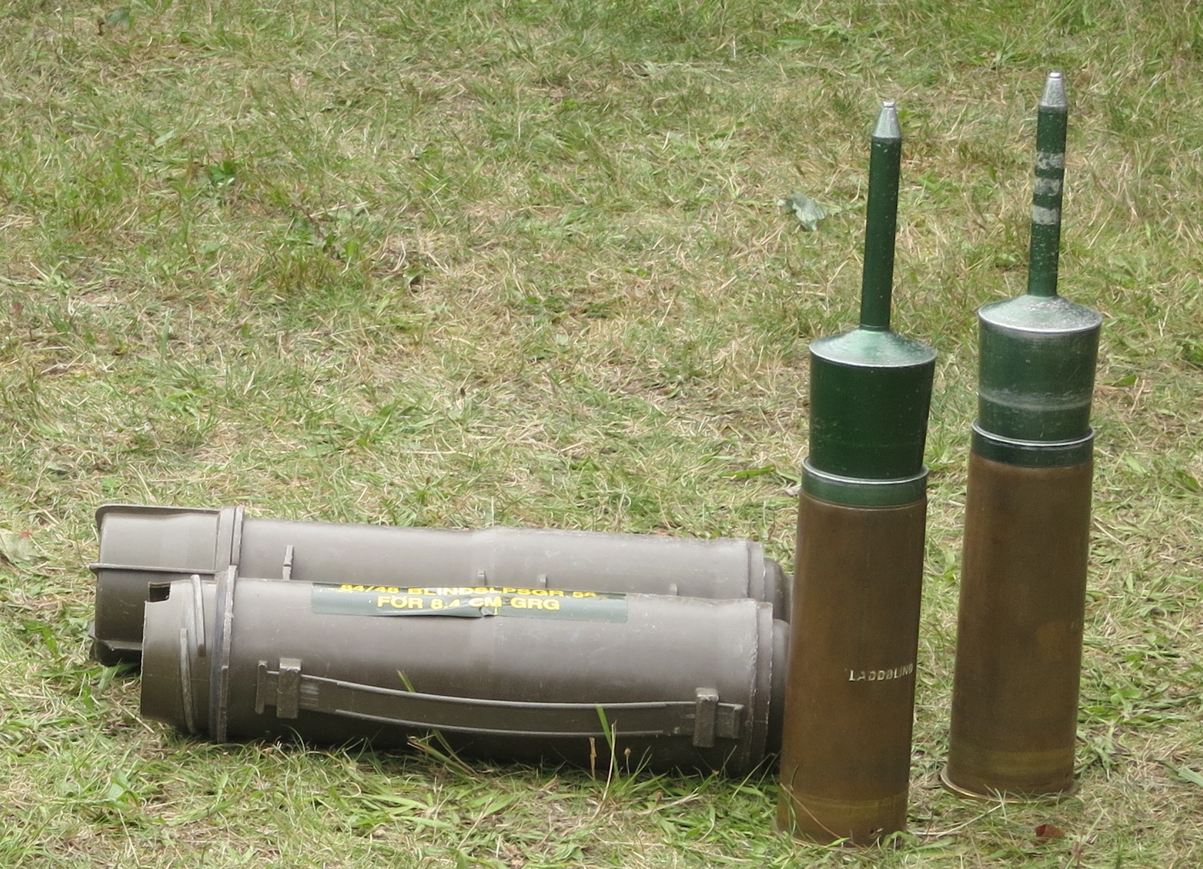 8,4 cm pansarskott, blind